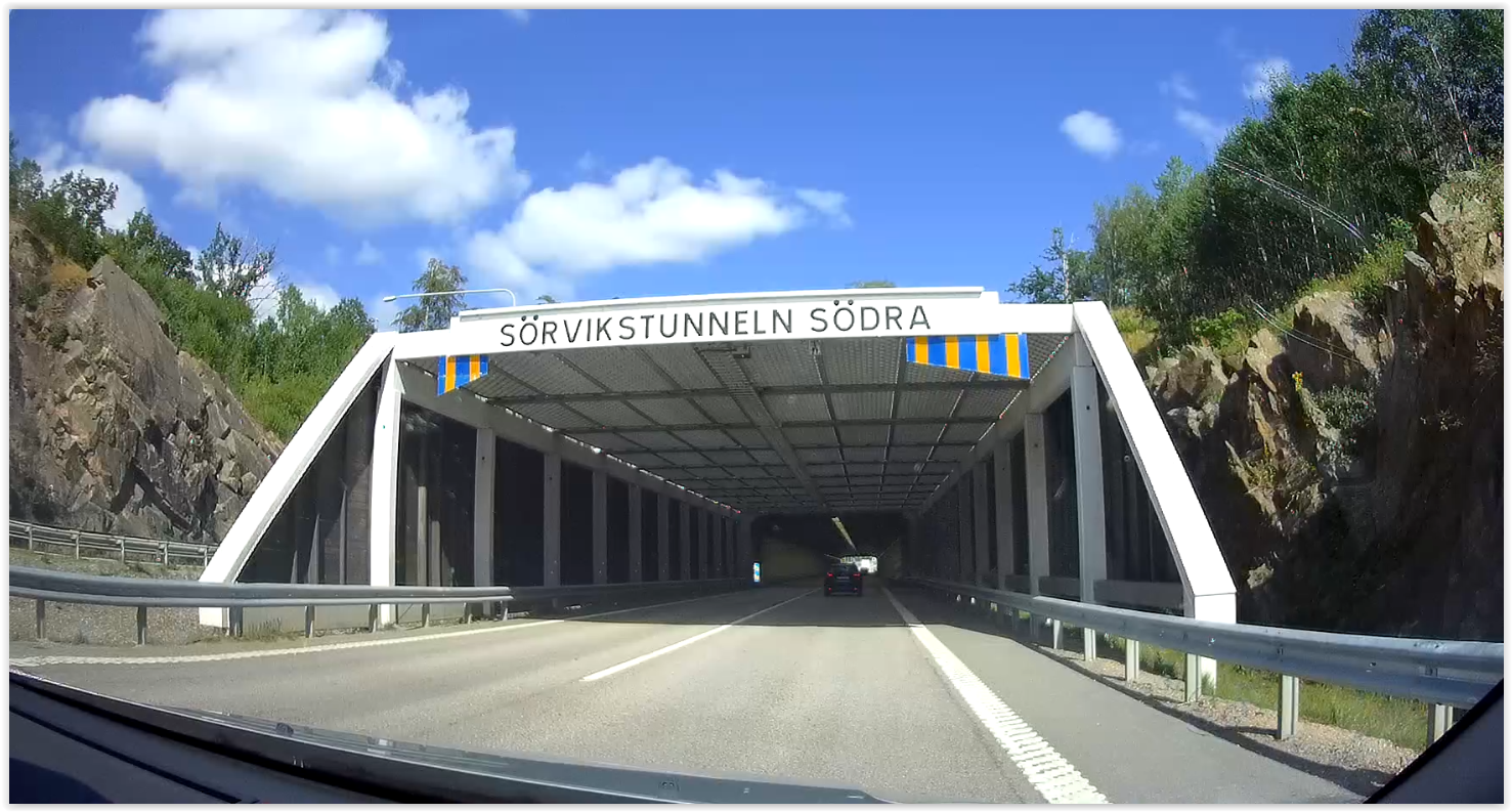 Sörvikstunneln södra infarten (Uddevalla)